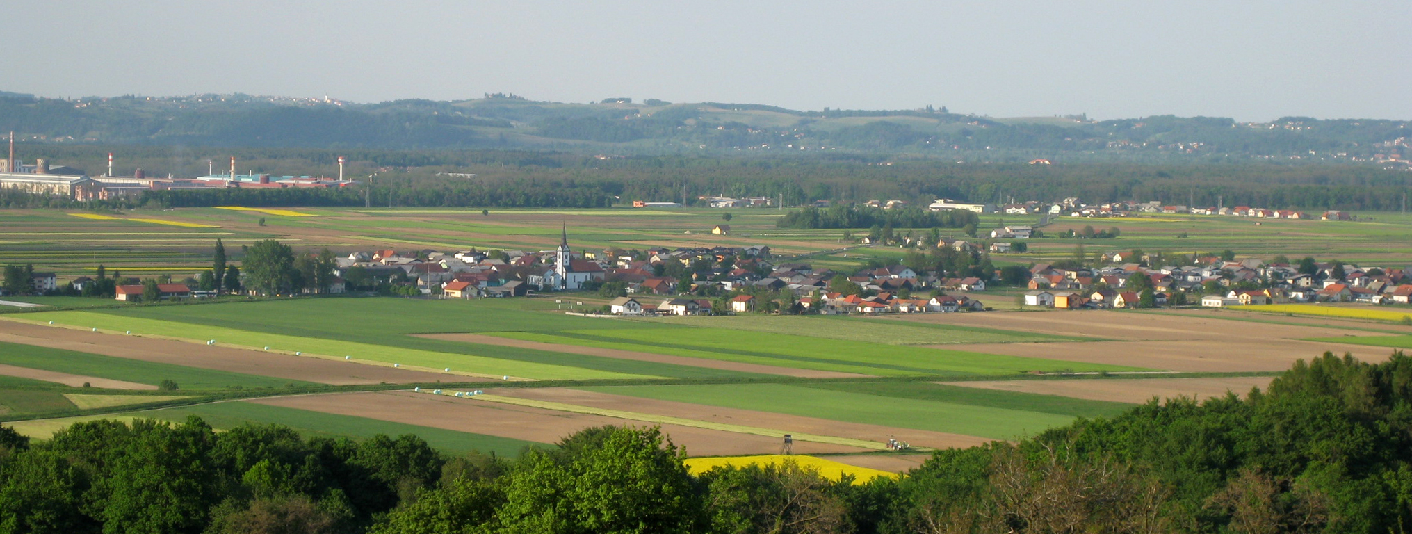 Lovrenc na Dravskem Polju, village in Slovenia